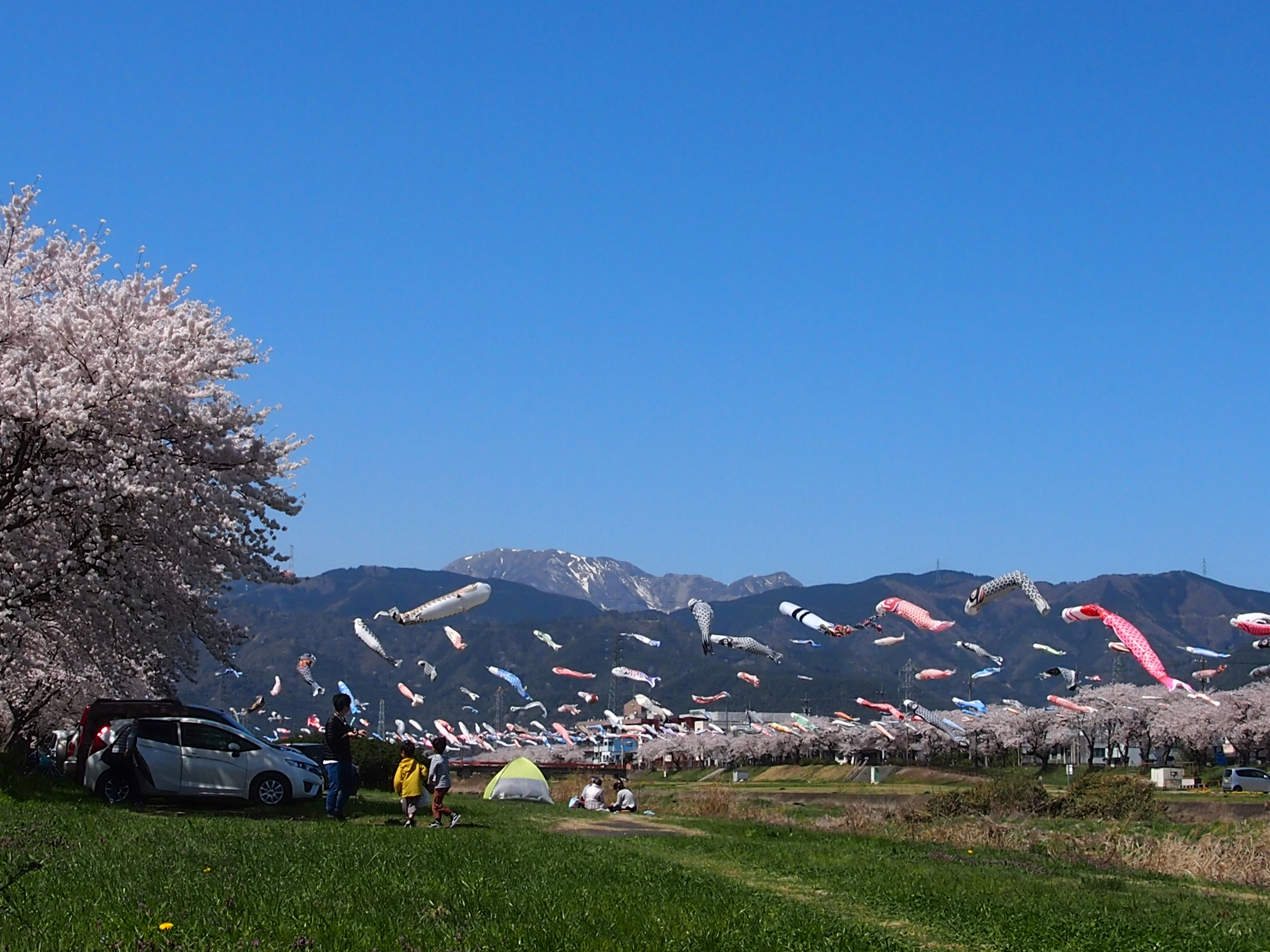 相川水辺公園（相川橋下）